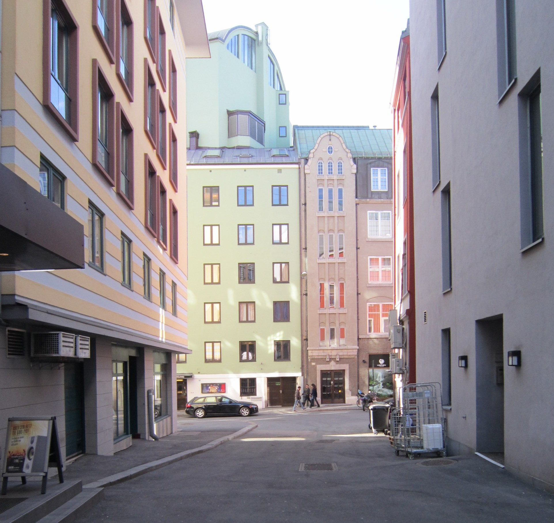 Smedkroken i Oslo sentrum